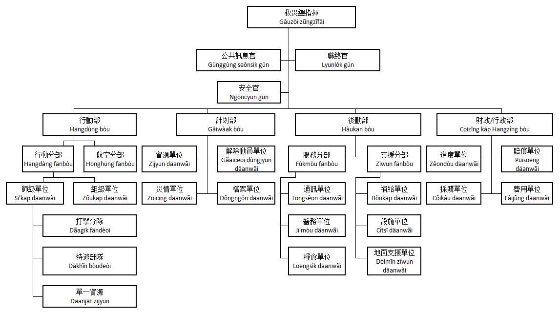 粵語: 災難指令系統組織架構圖